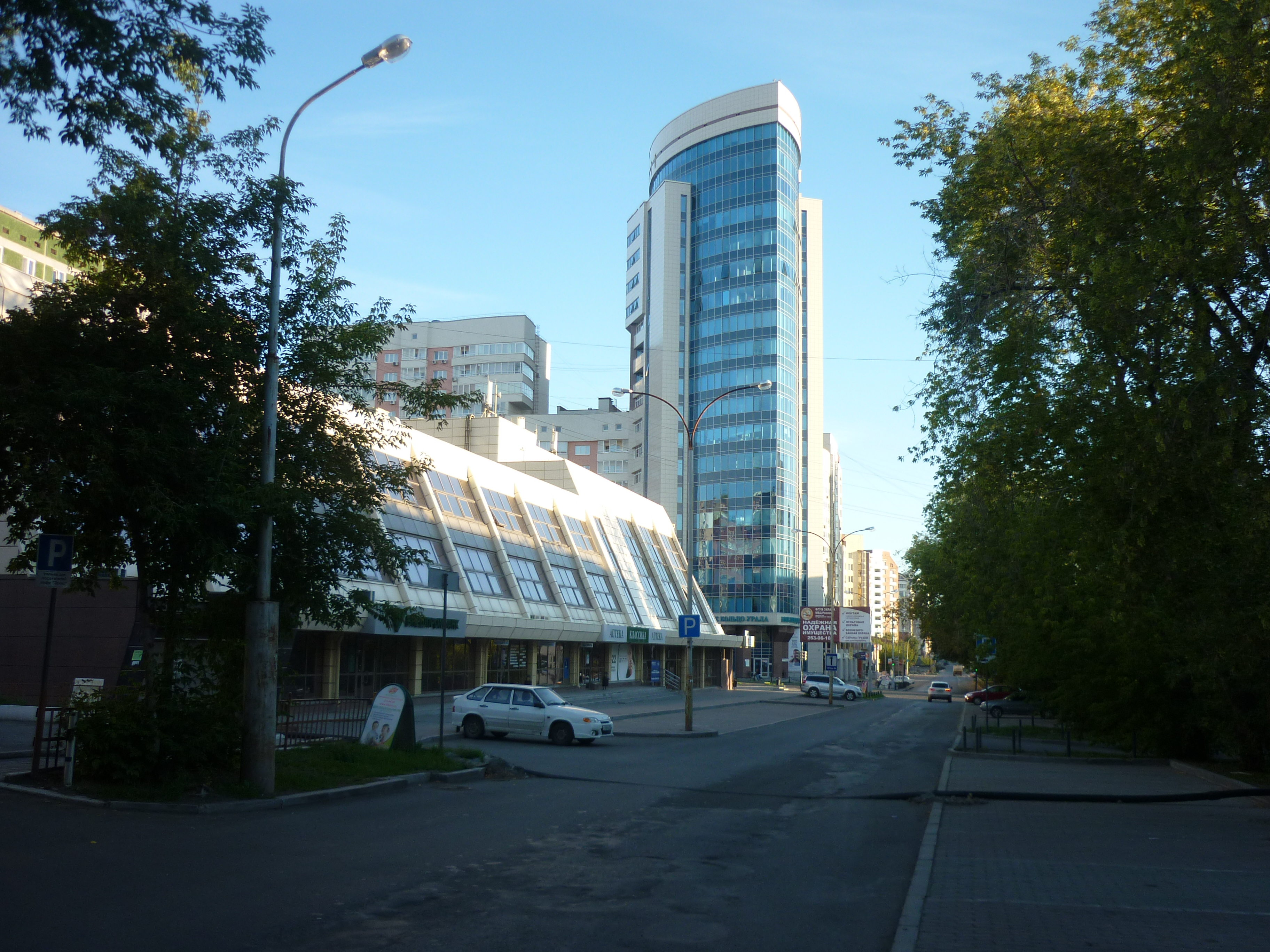 ТЦ Весенний, Бизнес-Центр Кристалл. Ул Хохрякова, Екатеринбург, дом 98 и 74 Вид на север с правой стороны улицы